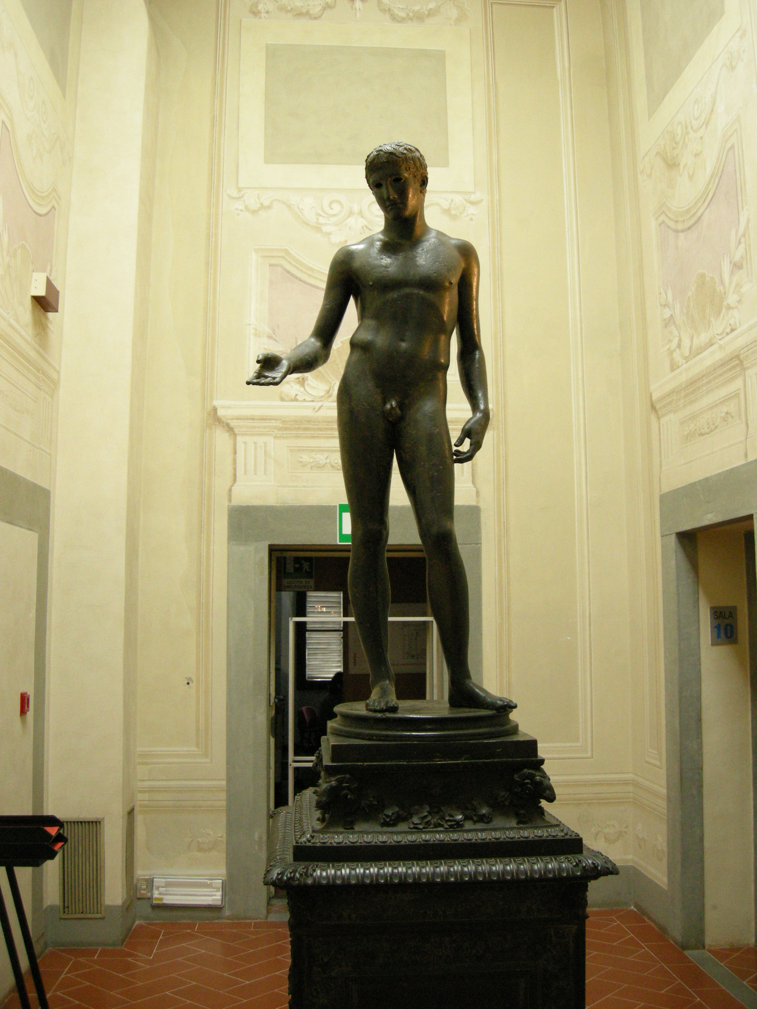 Apollino milani da osimo